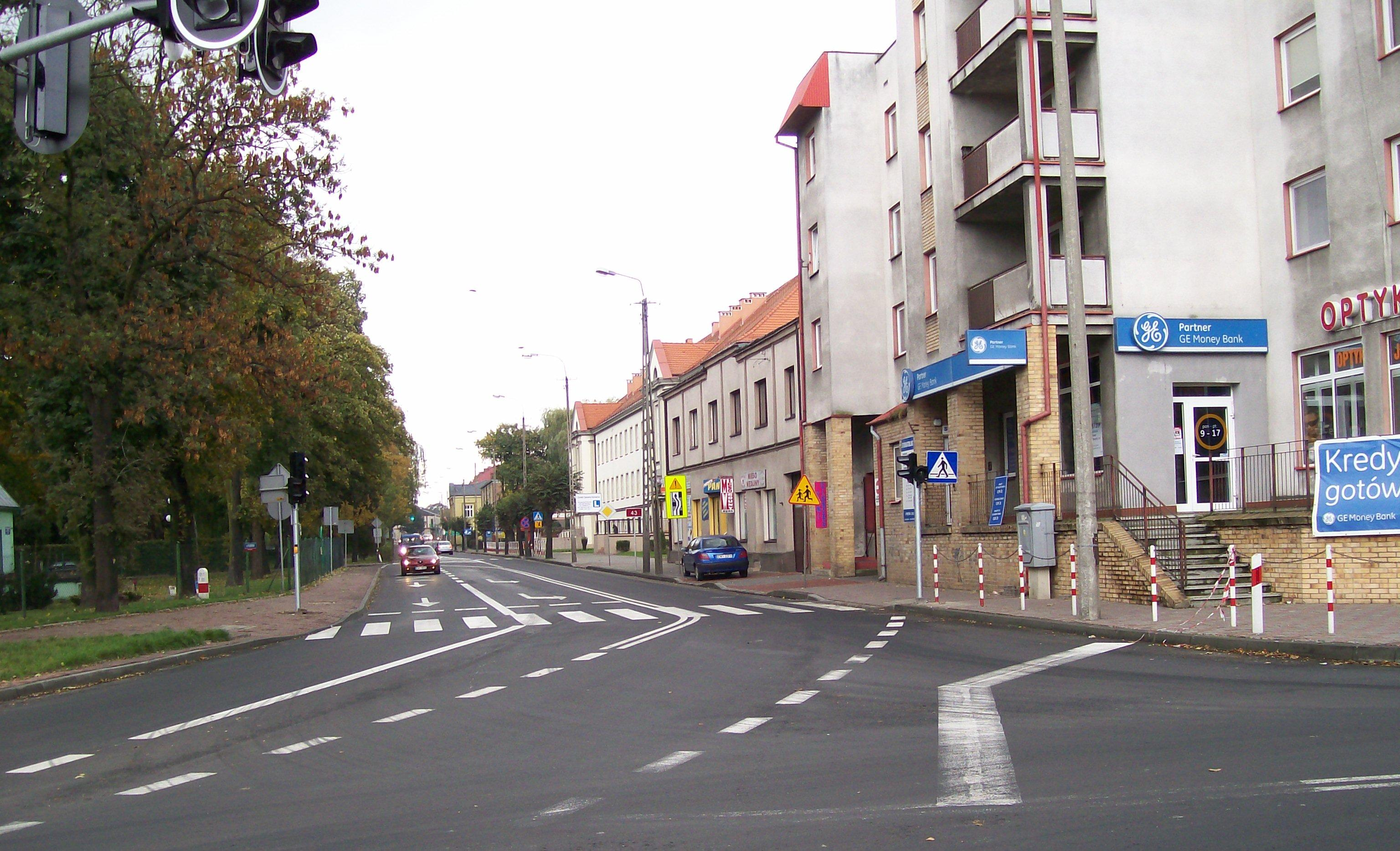 Widok na ulicę Piłsudskiego (DK43) w Wieluniu ze skrzyżowania z DK45 (ulicą Kopernika)